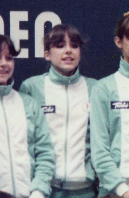 Victoria García con la selección nacional en la Final de la Copa del Mundo de Belgrado en 1983.